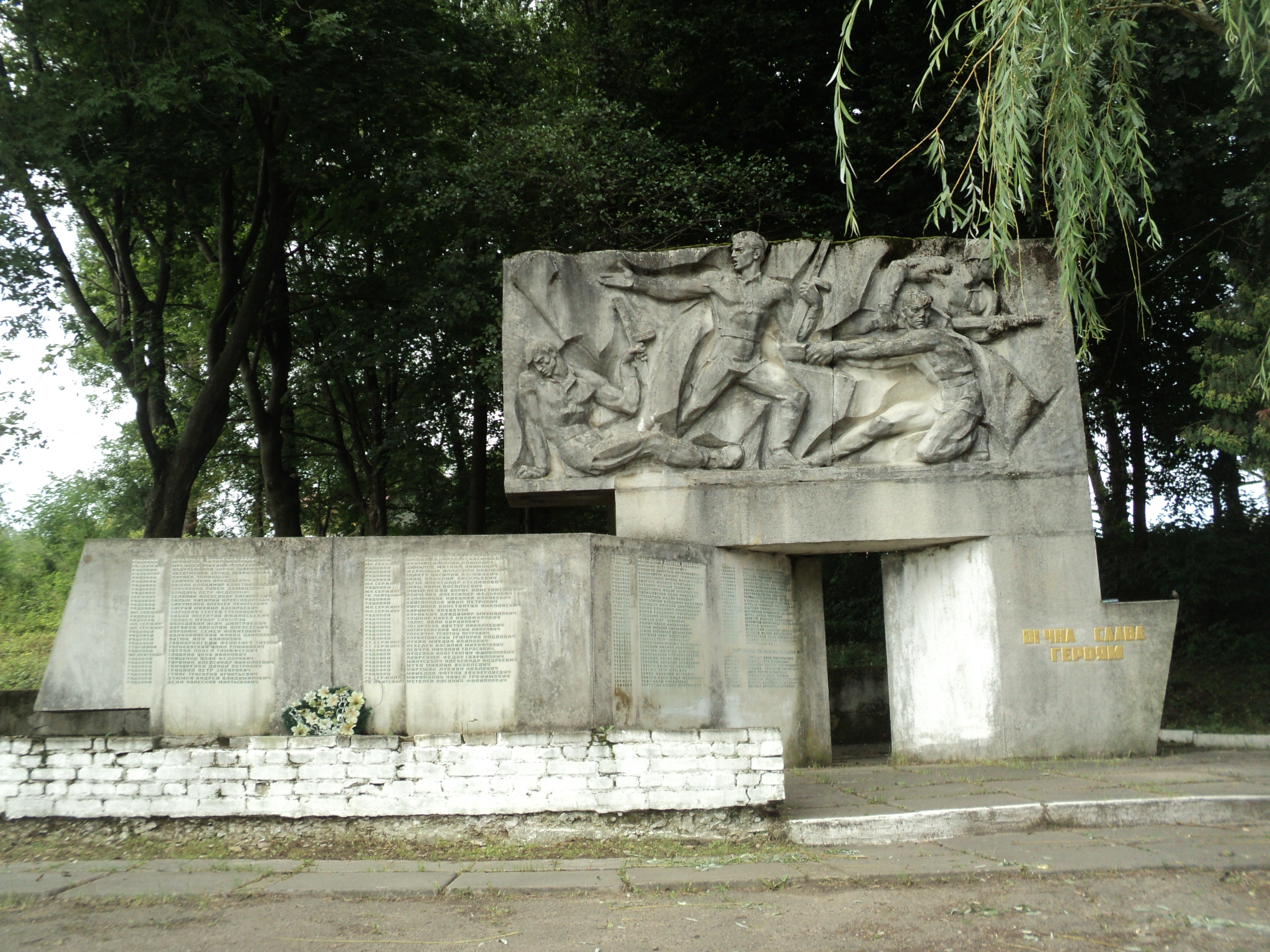 Село Крукеничи (Украина). Памятник красноармейцам, павшим при штурме села во время Великой Отечественной войны. Список погибших.